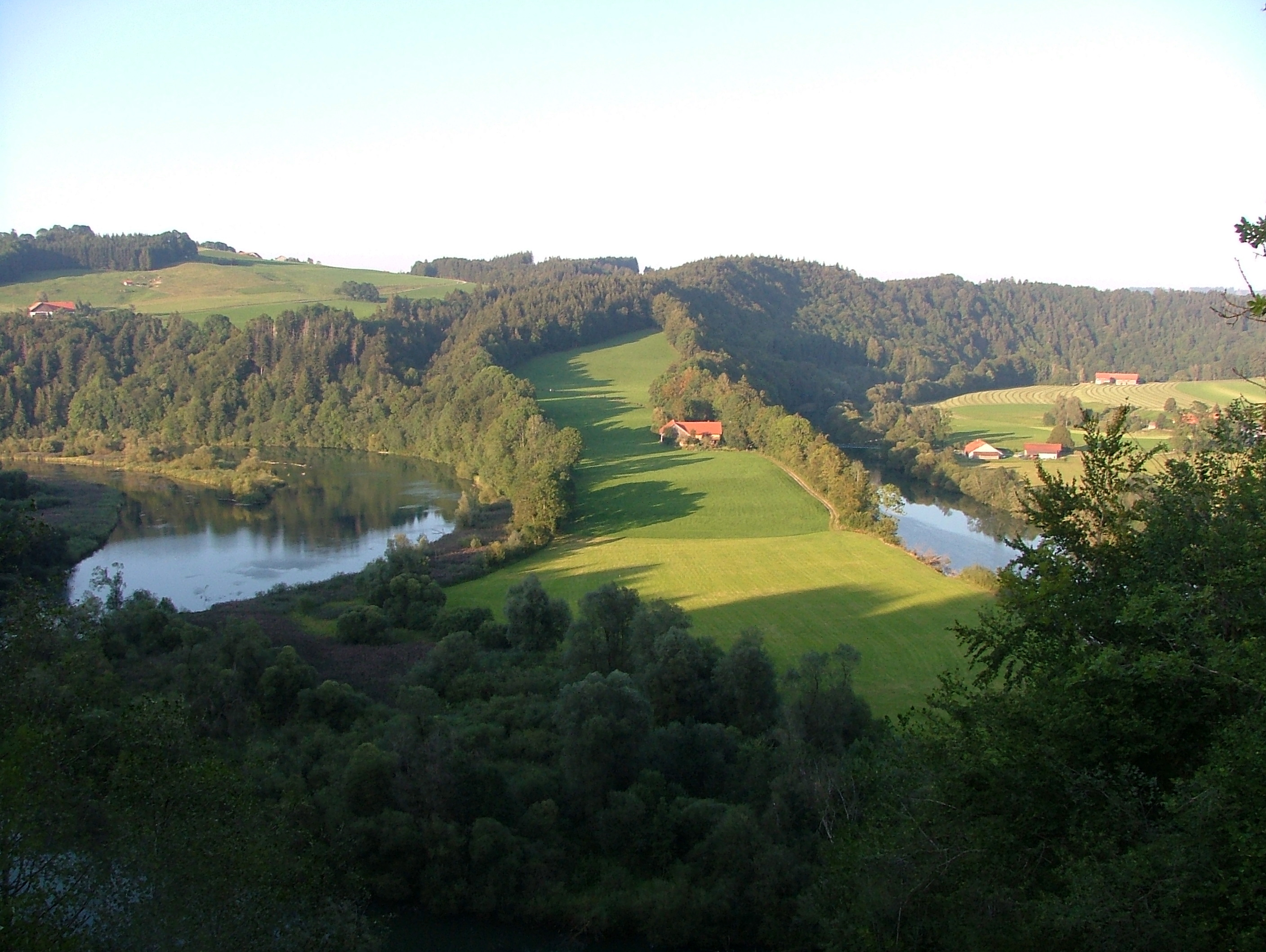 Illerdurchbruch